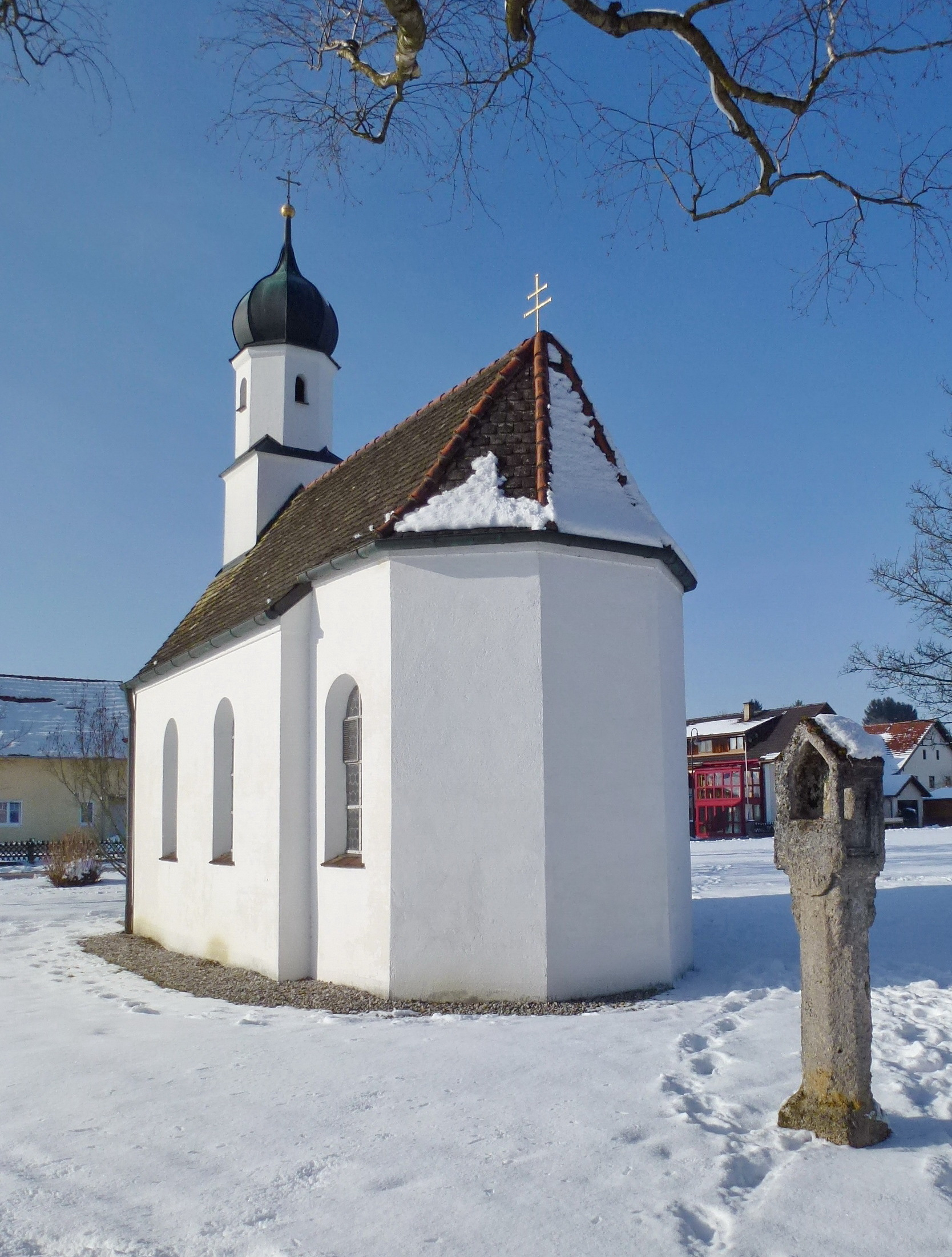 Eching am Ammersee: Kapelle St. Sebastian, Greifenberger Str. (Abweichung von der Bezeichnung "Ringstr. 17", wie beim Landesdenkmalsamt angegeben !). Ansicht von O